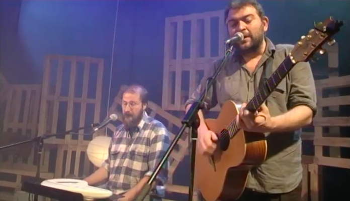 El grup cantautor barceloní Inspira a RTVC el 18 d’abr. 2014.